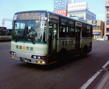 青森市営バス中型ワンステップ車（自主発注車両）青森駅にて